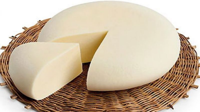 Vastedda della Valle del Belice